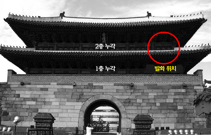 2008년 숭례문 화재 사고의 발화 추정위치